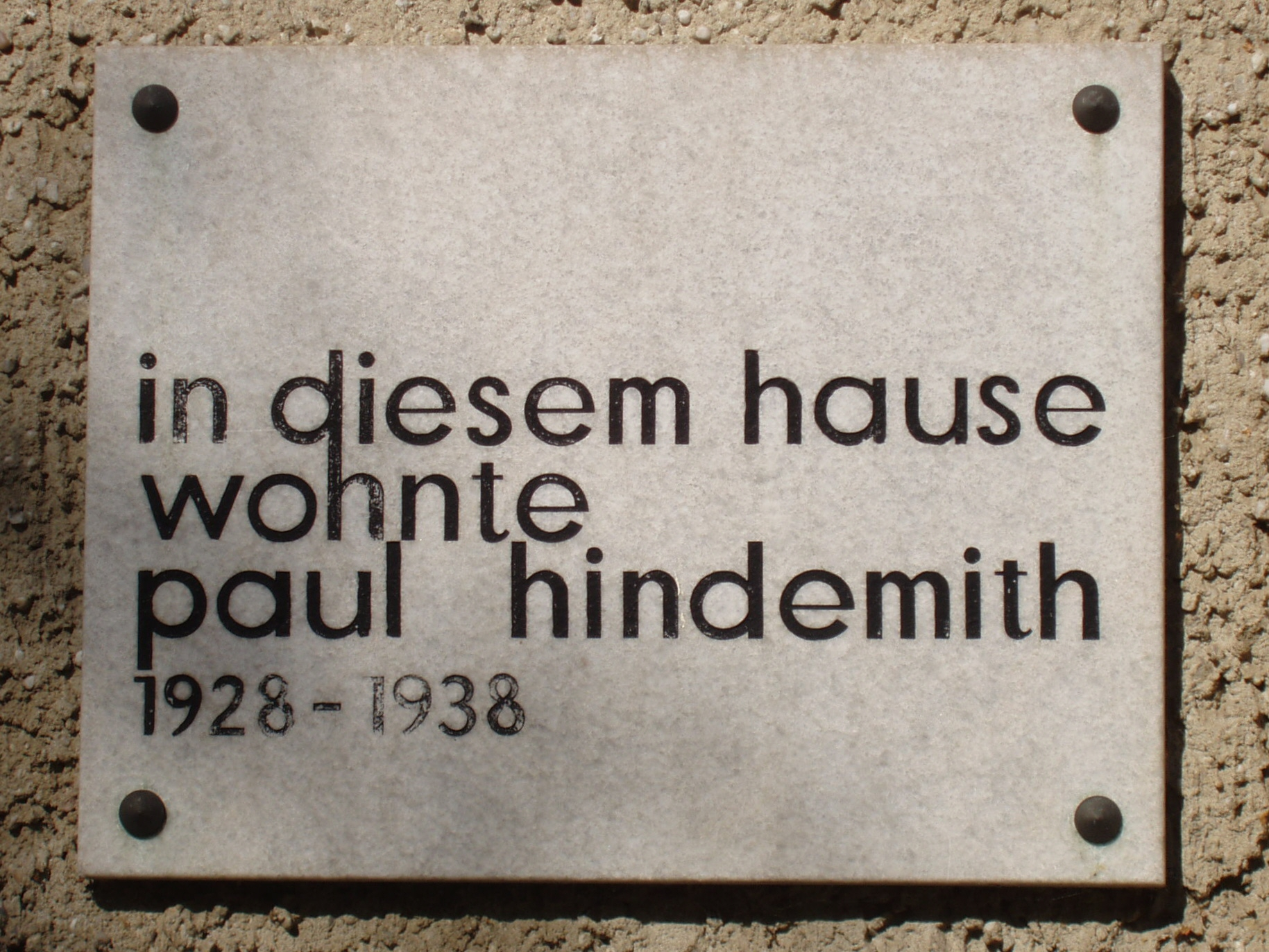 Gedenktafel für Paul Hindemith, Brixplatz 2, Berlin.